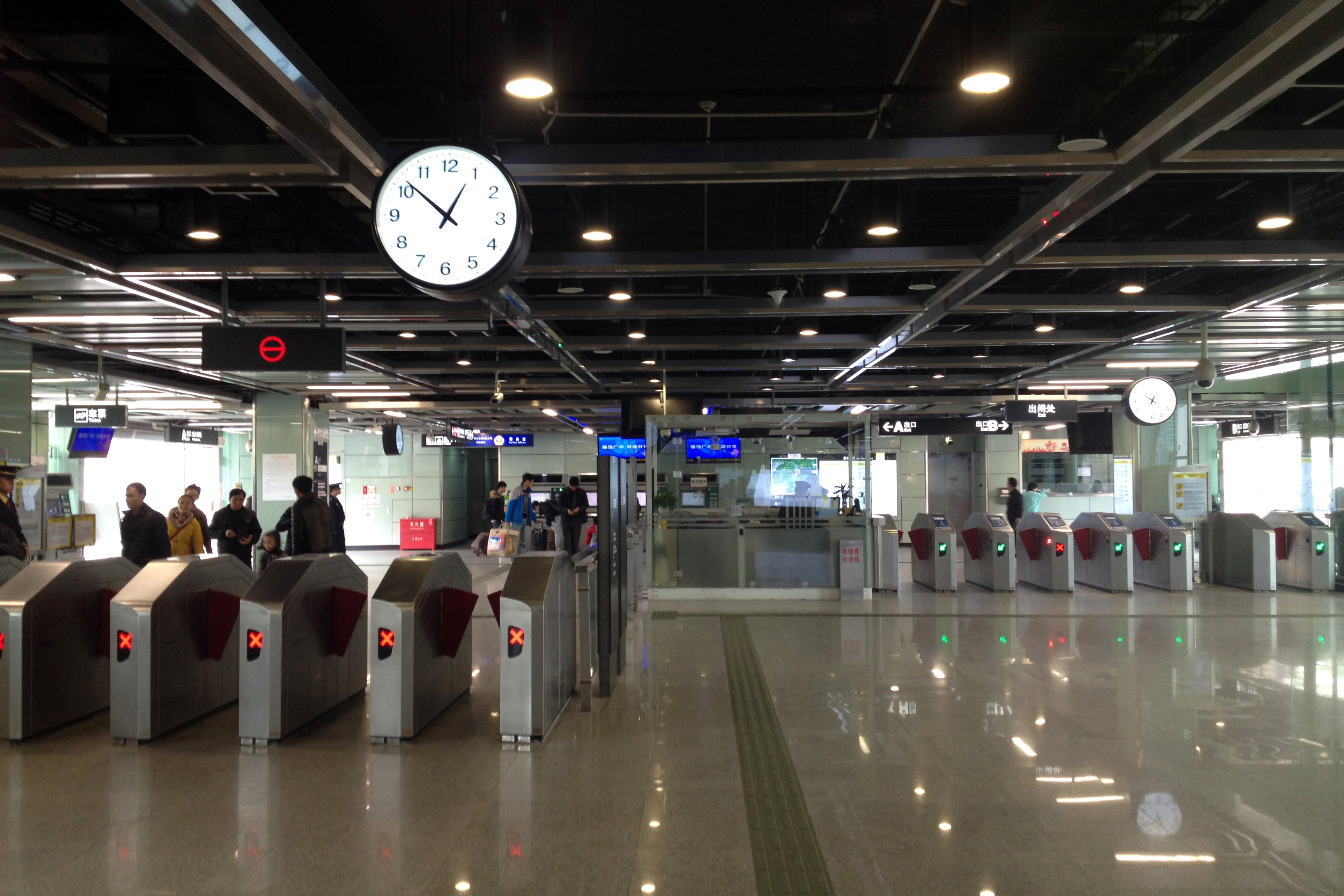 广州地铁浔峰岗站站厅